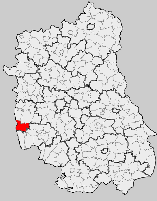 Map of gmina Józefów nad Wisłą, Opole Lubelskie county, Lublin voivodship Mapa gminy Józefów nad Wisłą, powiat opolski, województwo lubelskie